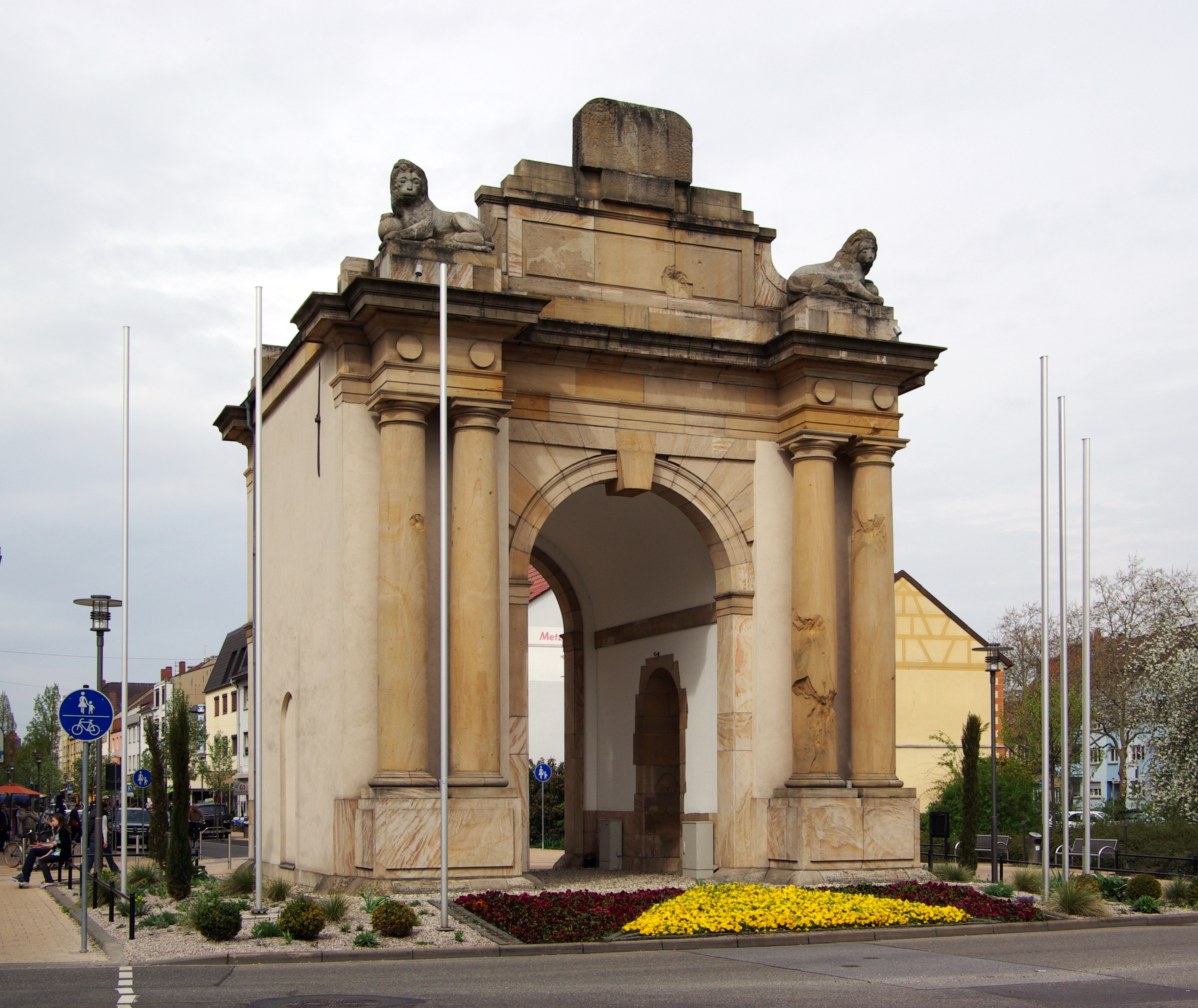 Frankenthal, Speyerer Tor von Süden